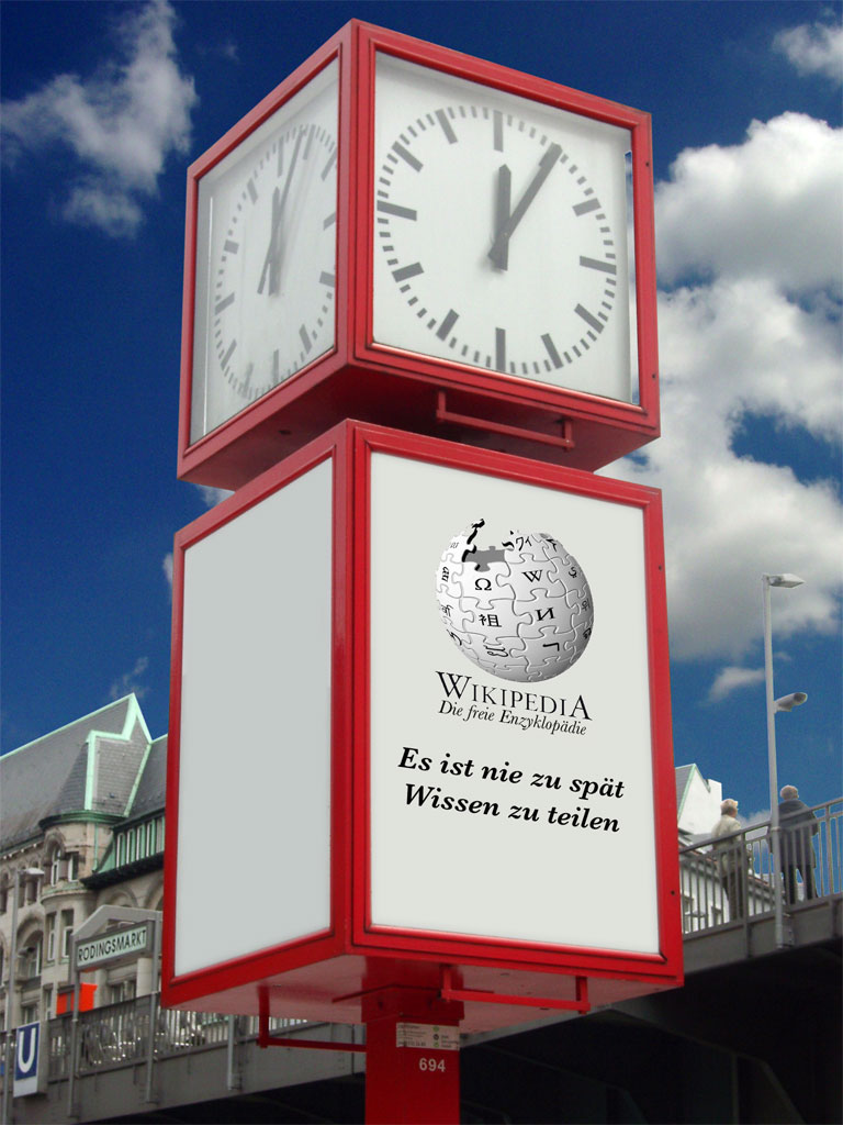 Uhr mit Wikipedia-Werbung am Rödingsmarkt in Hamburg-Altstadt